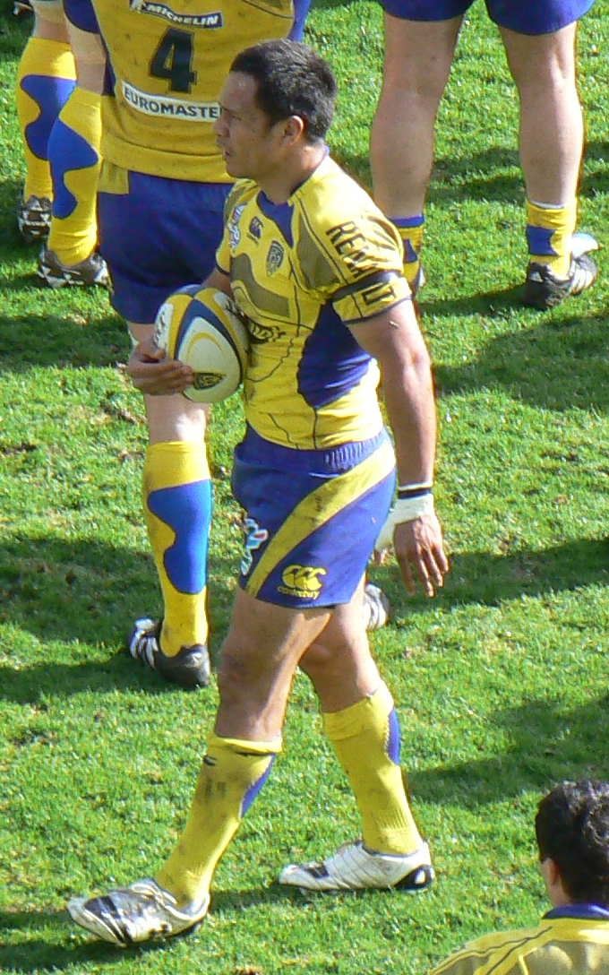 Le rugbyman néo-zélandais Kevin Senio affronte le Montpellier HRC avec l'ASM Clermont Auvergne au Stade Marcel Michelin de Clermont-Ferrand.